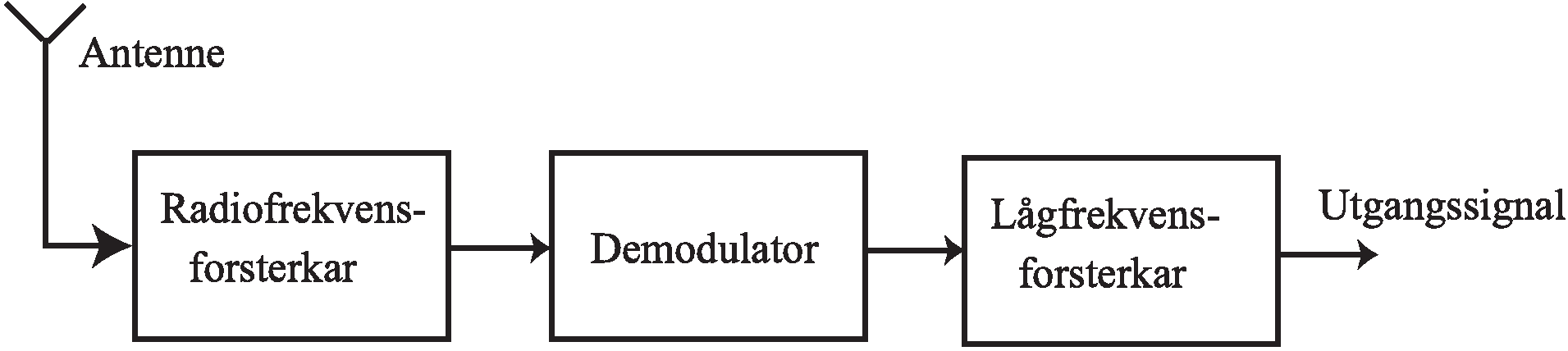 Schéma de principe du récepteur radio